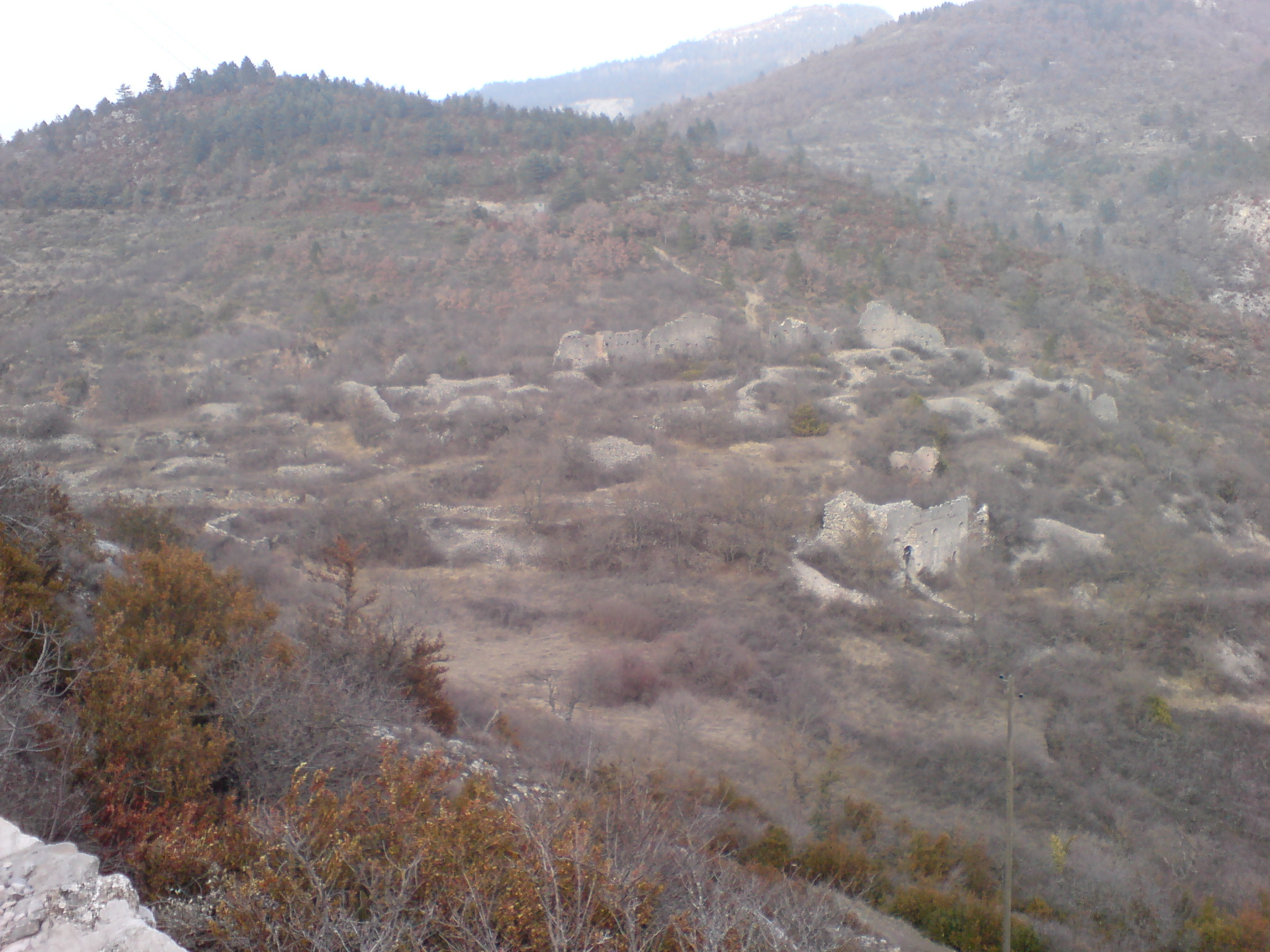 Vue de l'ancien site de Castellane, un peu au-dessus du site de la ville actuelle, avec l'ancienne église Saint-André